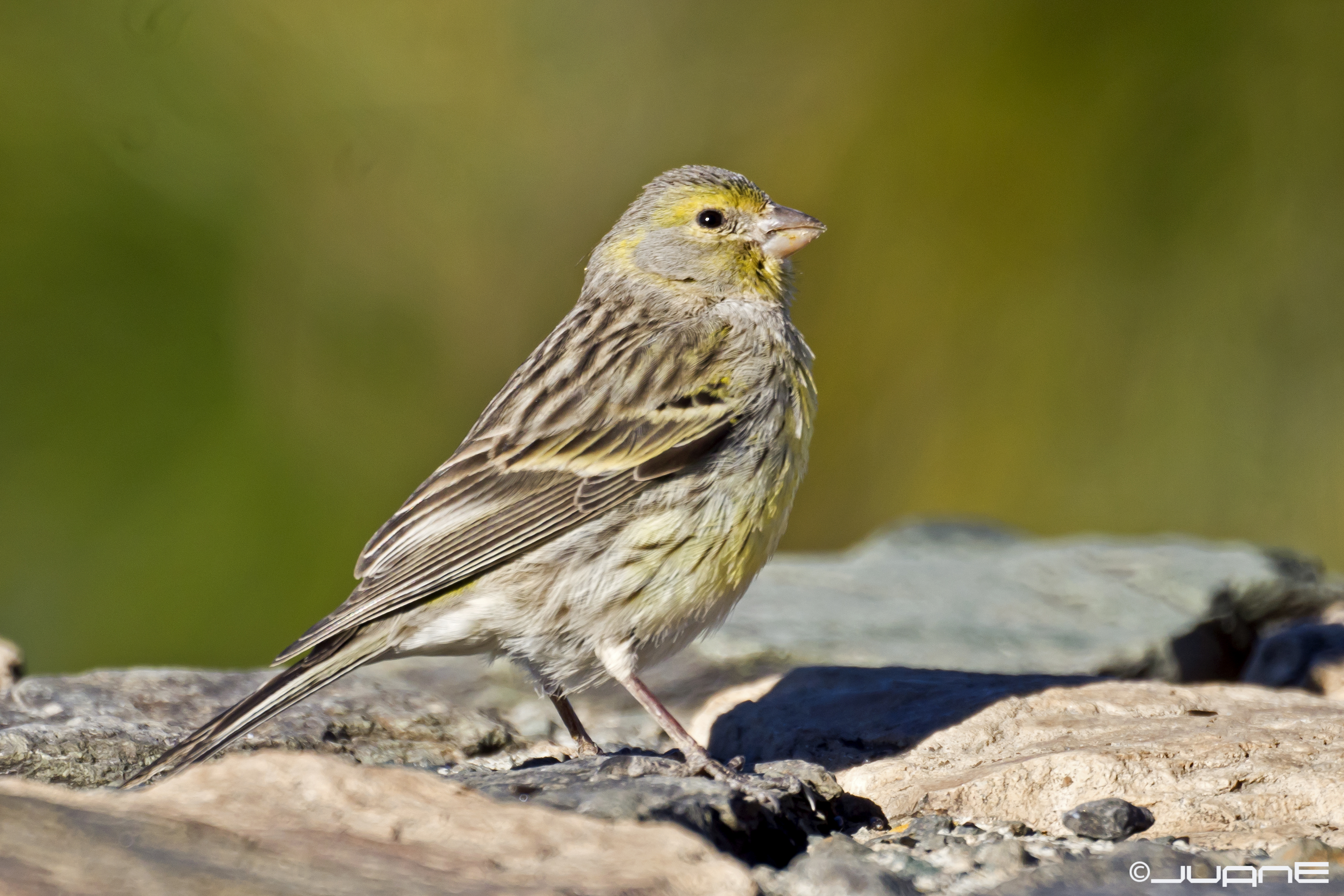 Canario silvestre, Serinus canarius